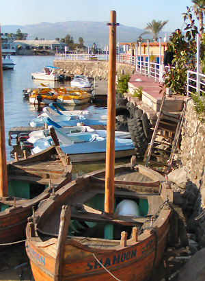 Tiberias (Tverya) am See Genezareth (Yam Kinneret), Israel. Blick auf die Promenade am Hafen.